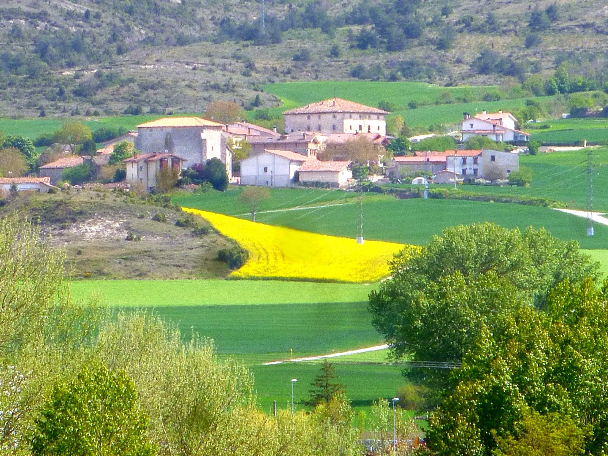 Subijana de Álava